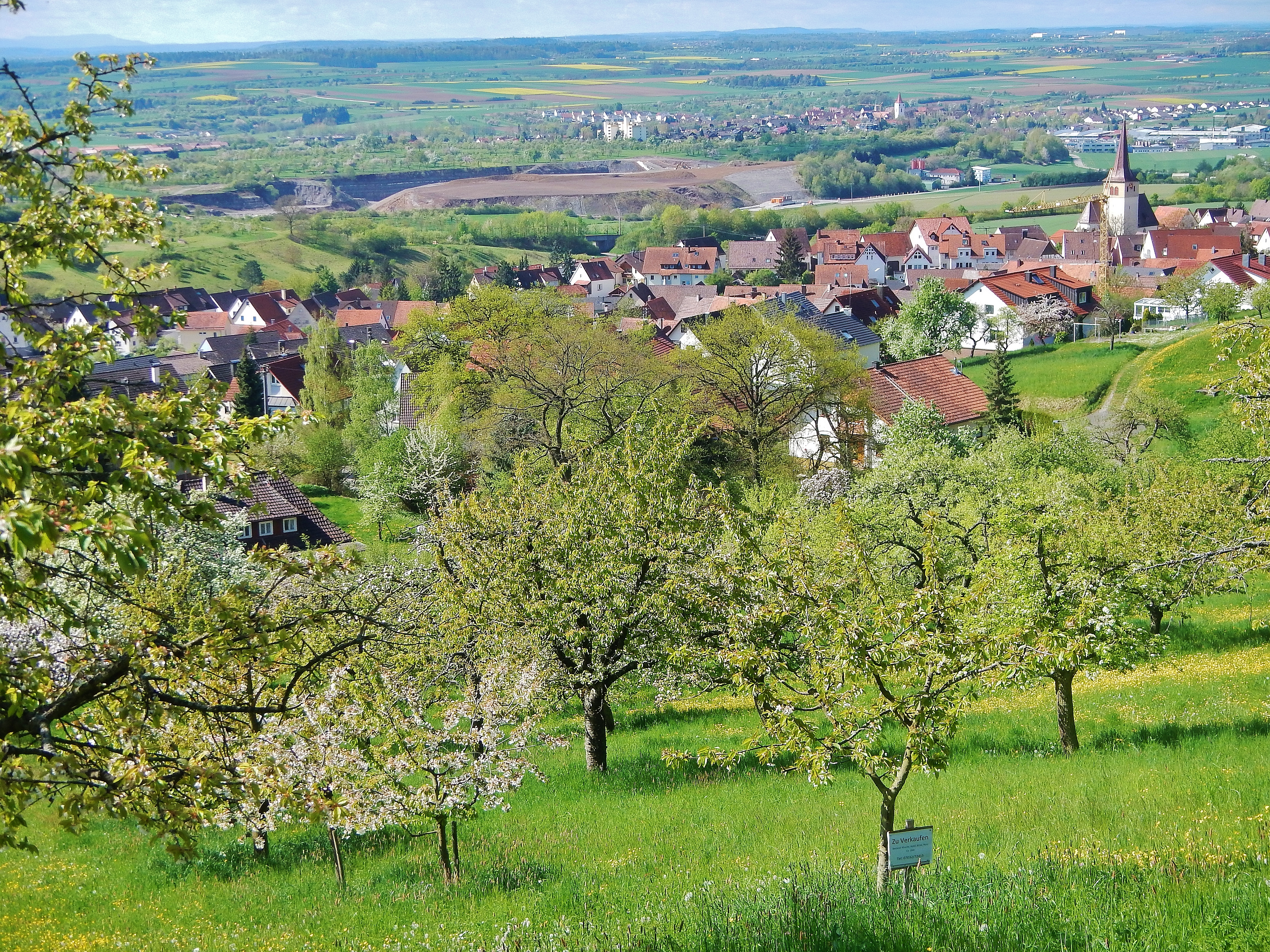 Blütenweg bei Kayh bei Herrenberg